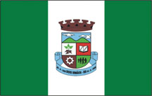 Bandeira do Município de Dois Irmãos, RS, Brasil